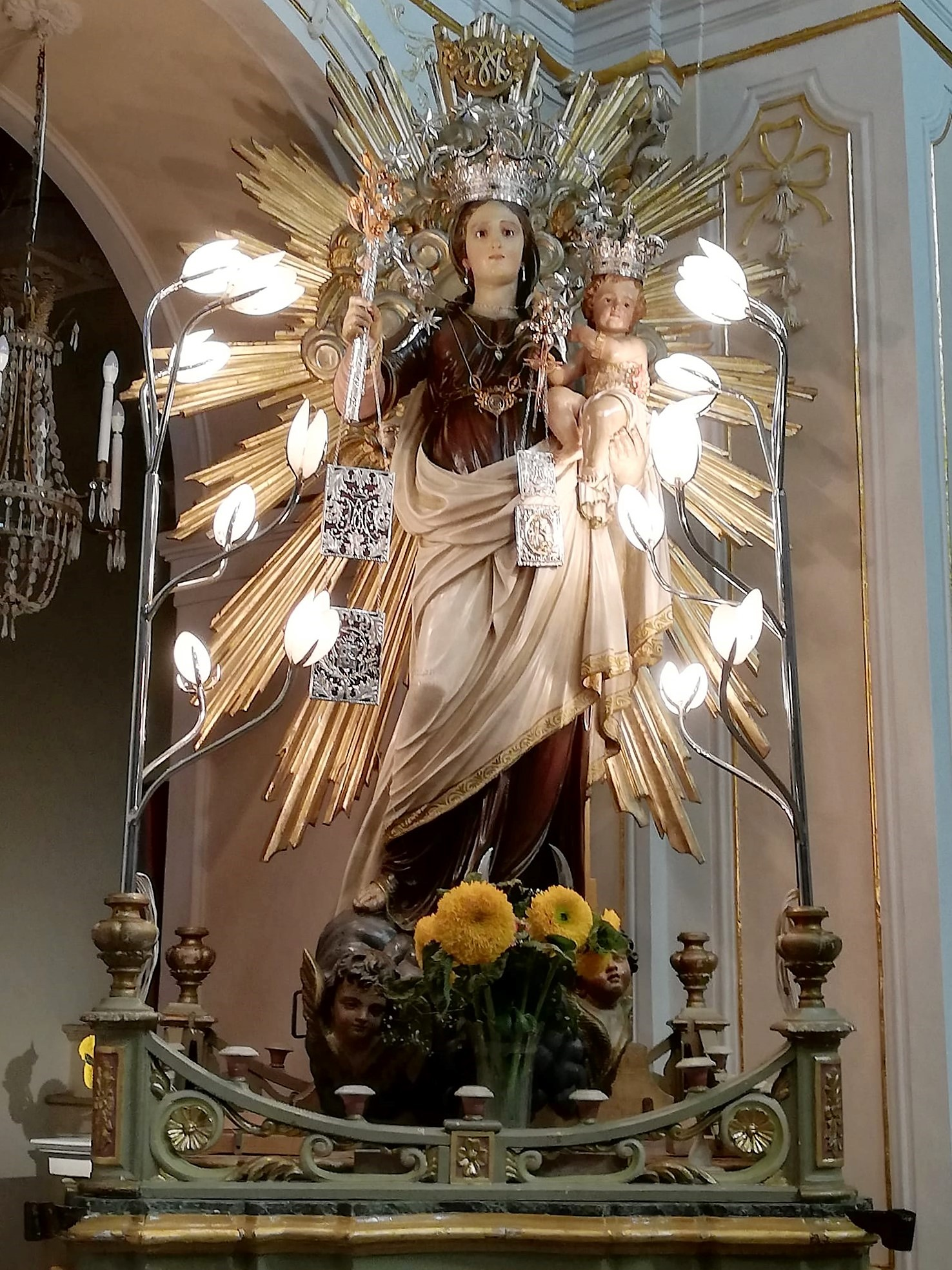 Simulacro